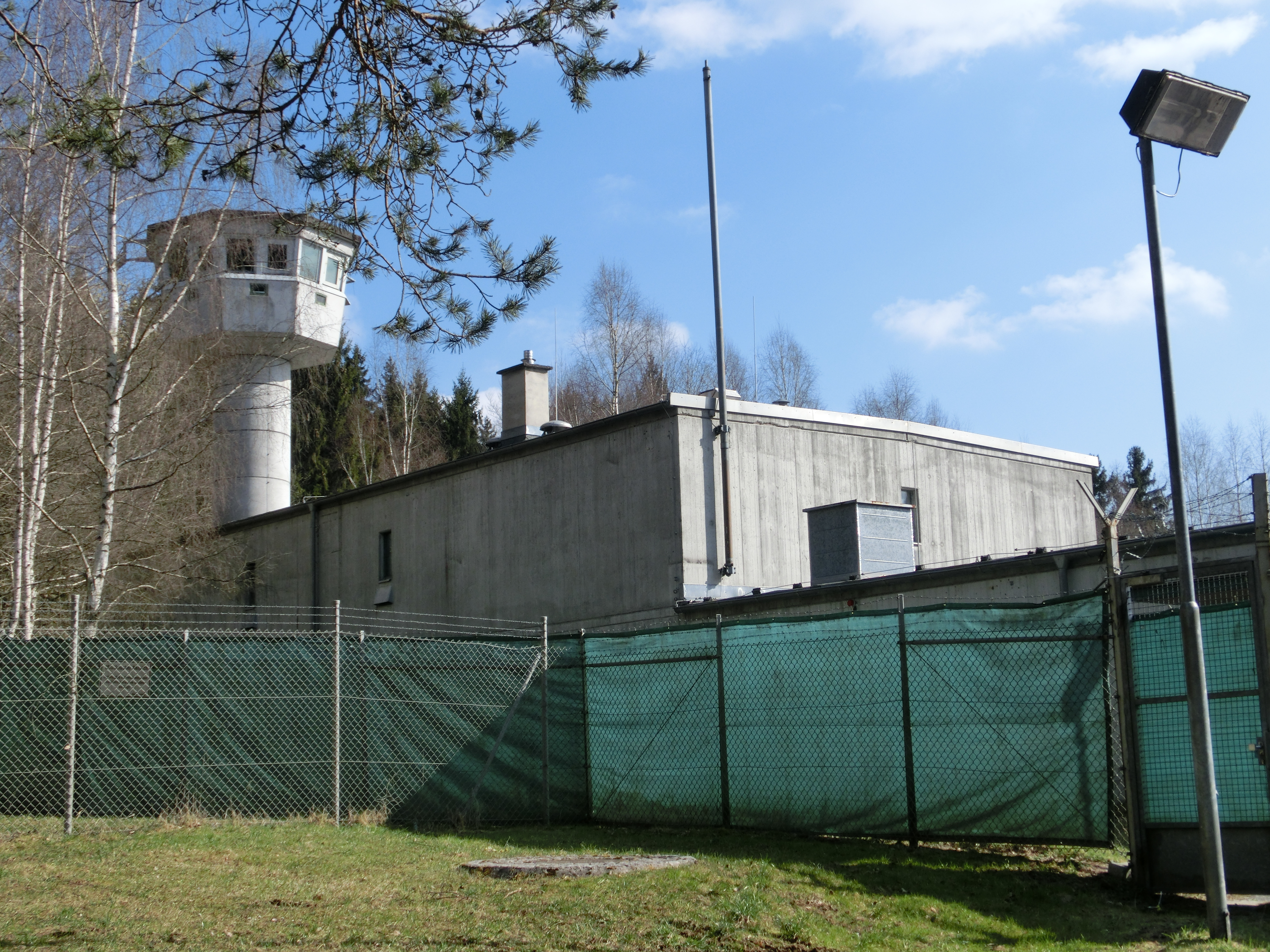 Deutschland - Baden-Württemberg - Landkreis Sigmaringen - Gemeinde Ostrach / Stadt Pfullendorf: Eingangsbereich des ehemaligen Munitionslagers Mottschieß